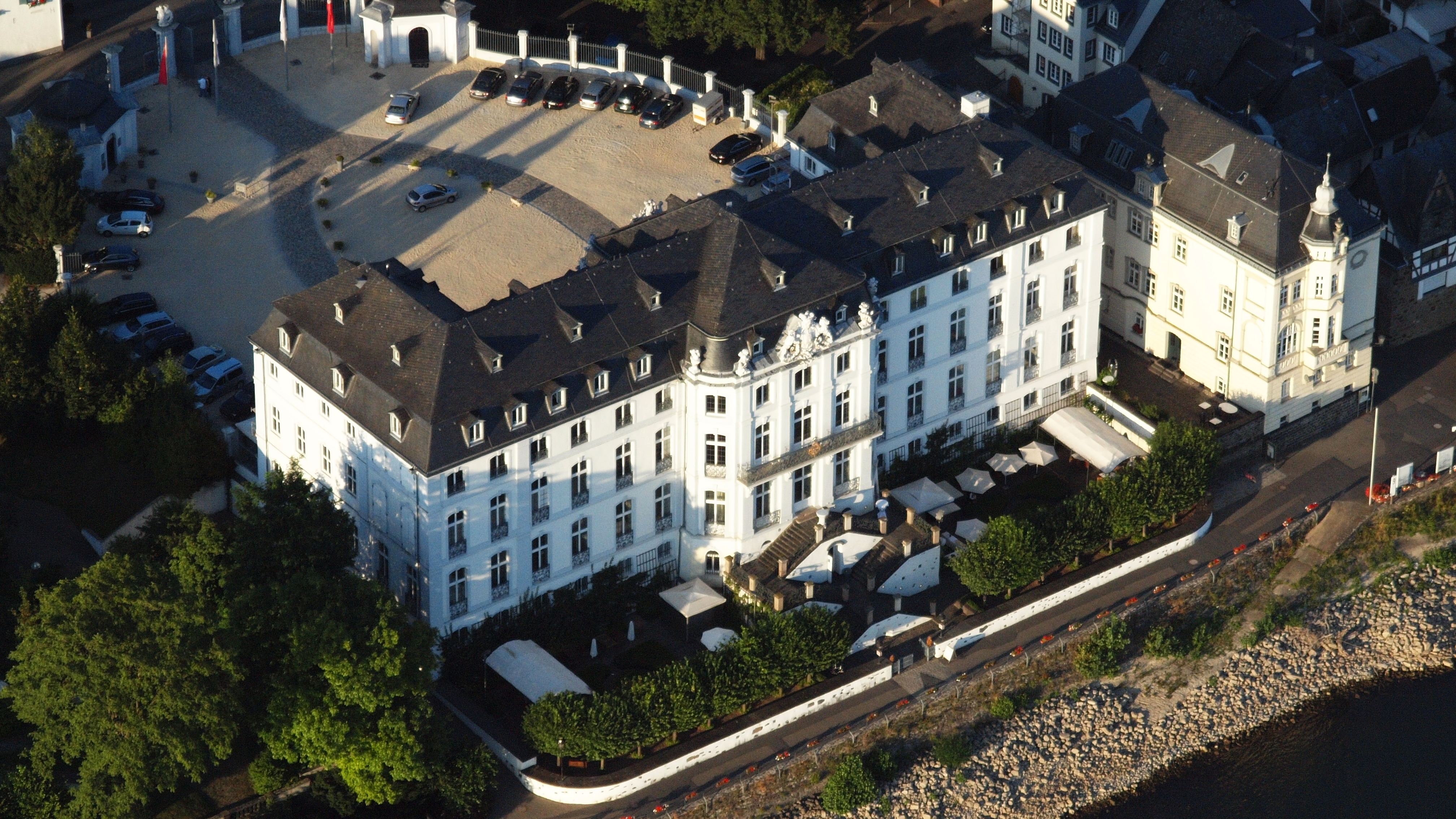 Schloss Engers: Luftaufnahme